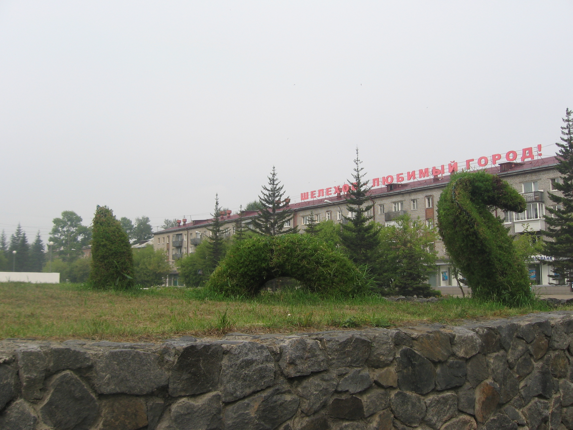 Змея на фасаде площади